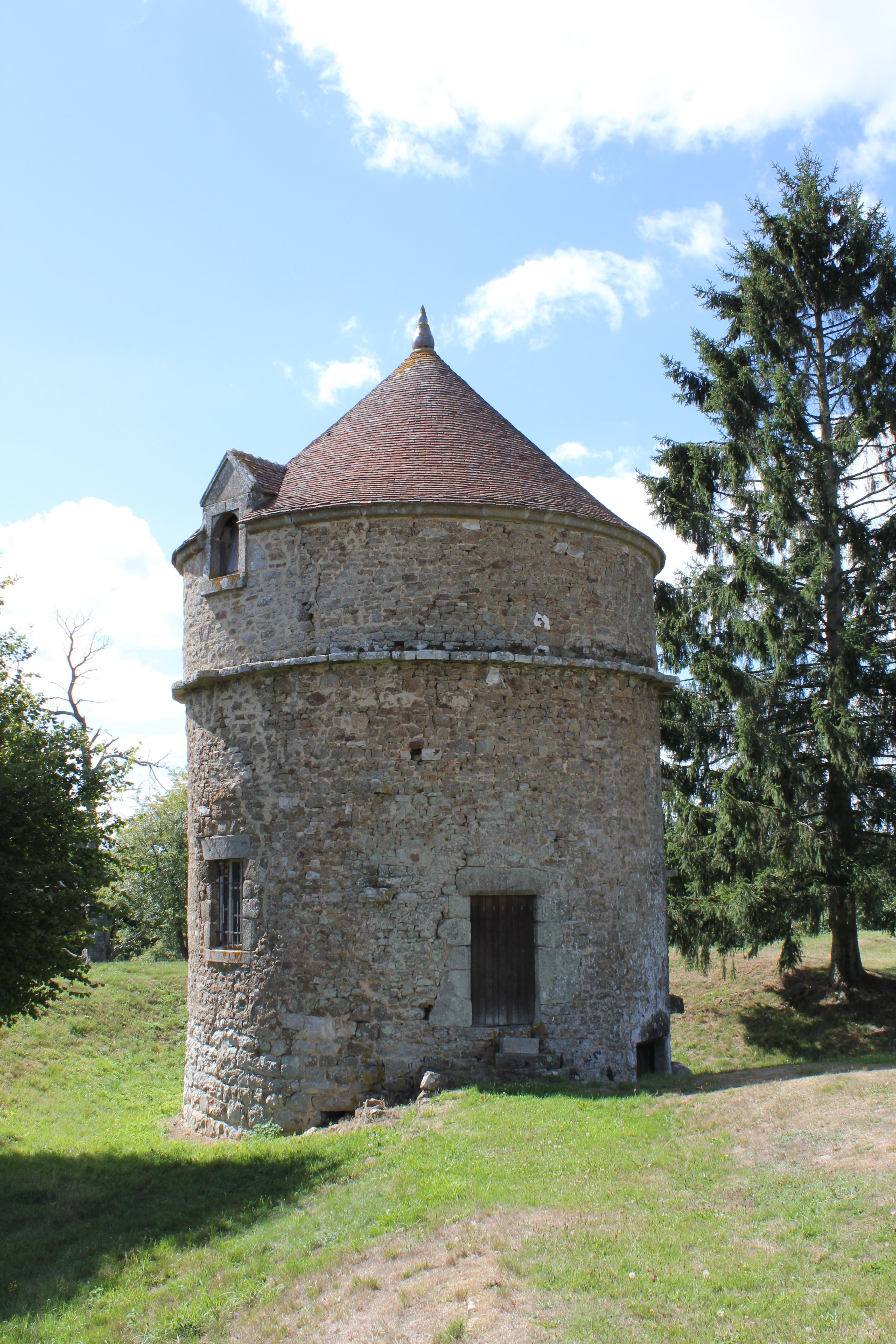 Colombier de l'ancien château de Bonvouloir, Juvigny-sous-Andaine, France